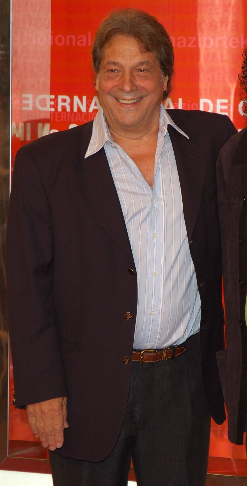 El actor español Sancho Gracia en el Festival Internacional de Cine de San Sebastián 2006